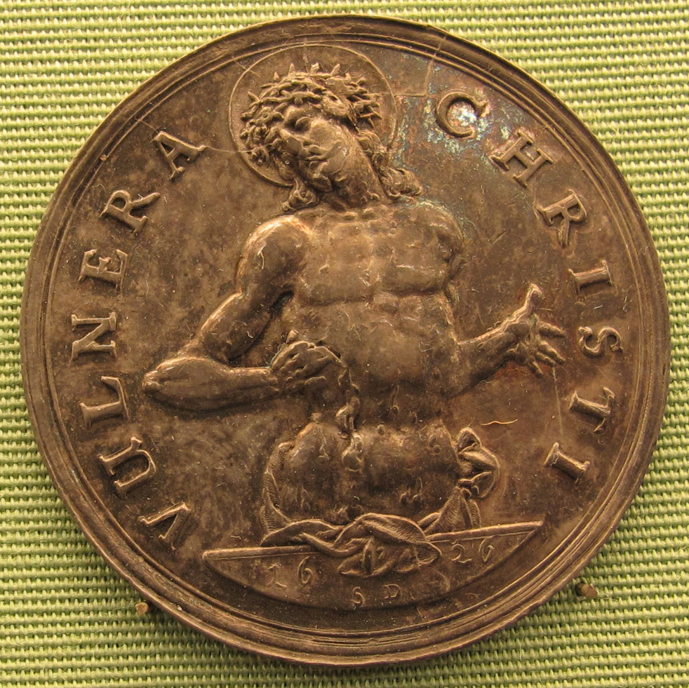 Sebastian dadler, uomo di dolori, 1626